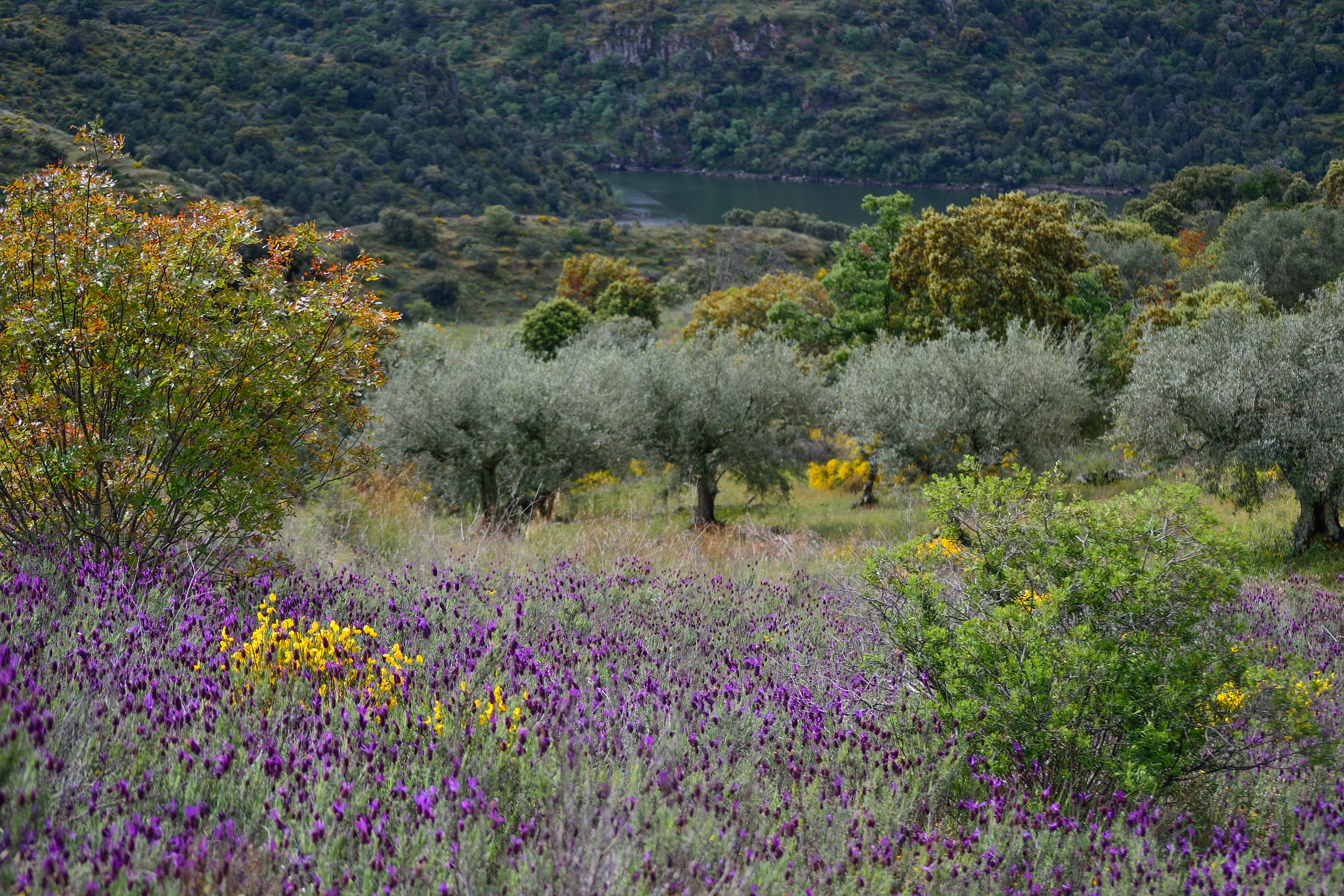 Arribes del Duero This is a photography of a Special Area of Conservation in Spain with the ID: ES4150096. Natura2000 entry, EEA entry